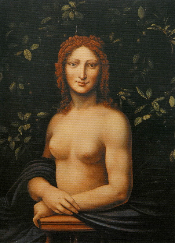 Monna Vanna